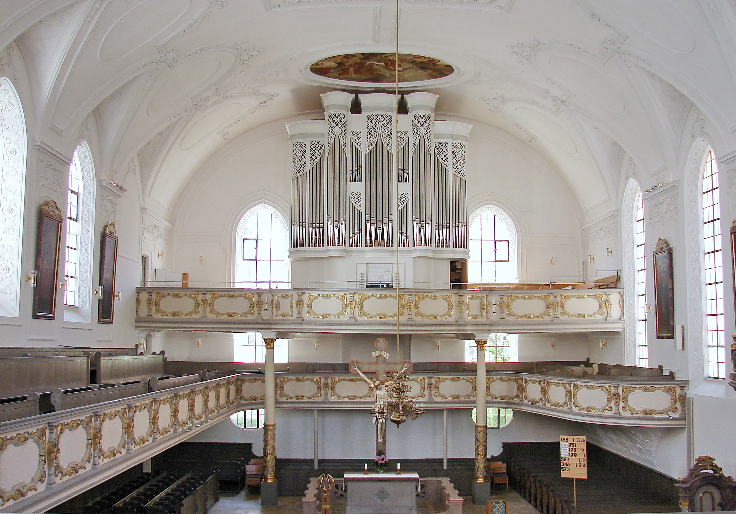 Evangelisch-Lutherische Stadtpfarrkirche Hl. Dreifaltigkeit, Saalbau, errichtet 1605, umbauten 1736/37, Turmbau 1820/21 bei gleichzeitiger Erhöhung der Kirche, Erneuerung 1901, mit Ausstattung